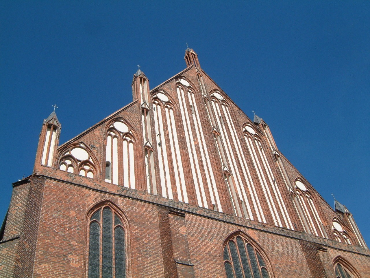 Ostfassade von St. Marien in Greifswald.